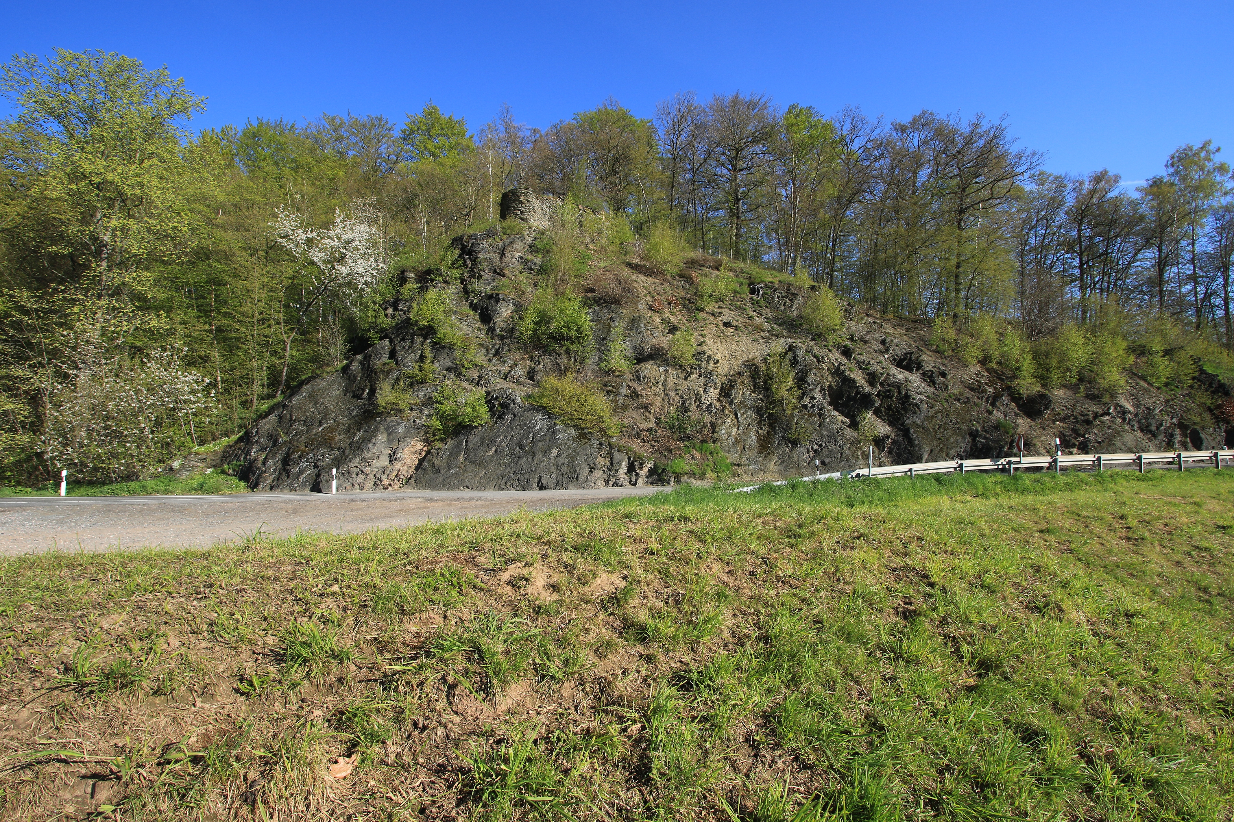 Felsen „Remser Bastei“ an der Waldenburger Straße (B 175) in Remse, Bereich im FFH-Gebiet DE-4842-301 „Mittleres Zwickauer Muldetal“.